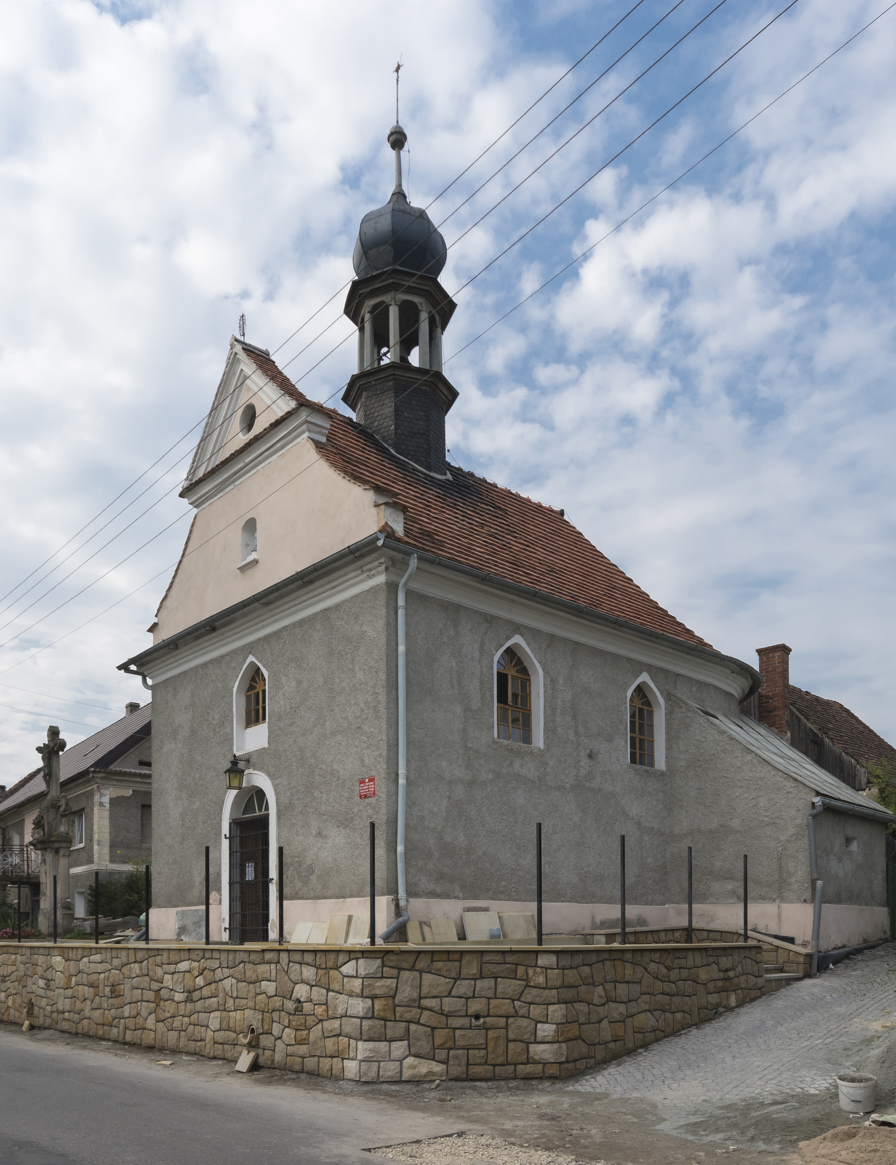 Gołogłowy, d. kaplica, ob. kościół pw. św. Antoniego, XIX